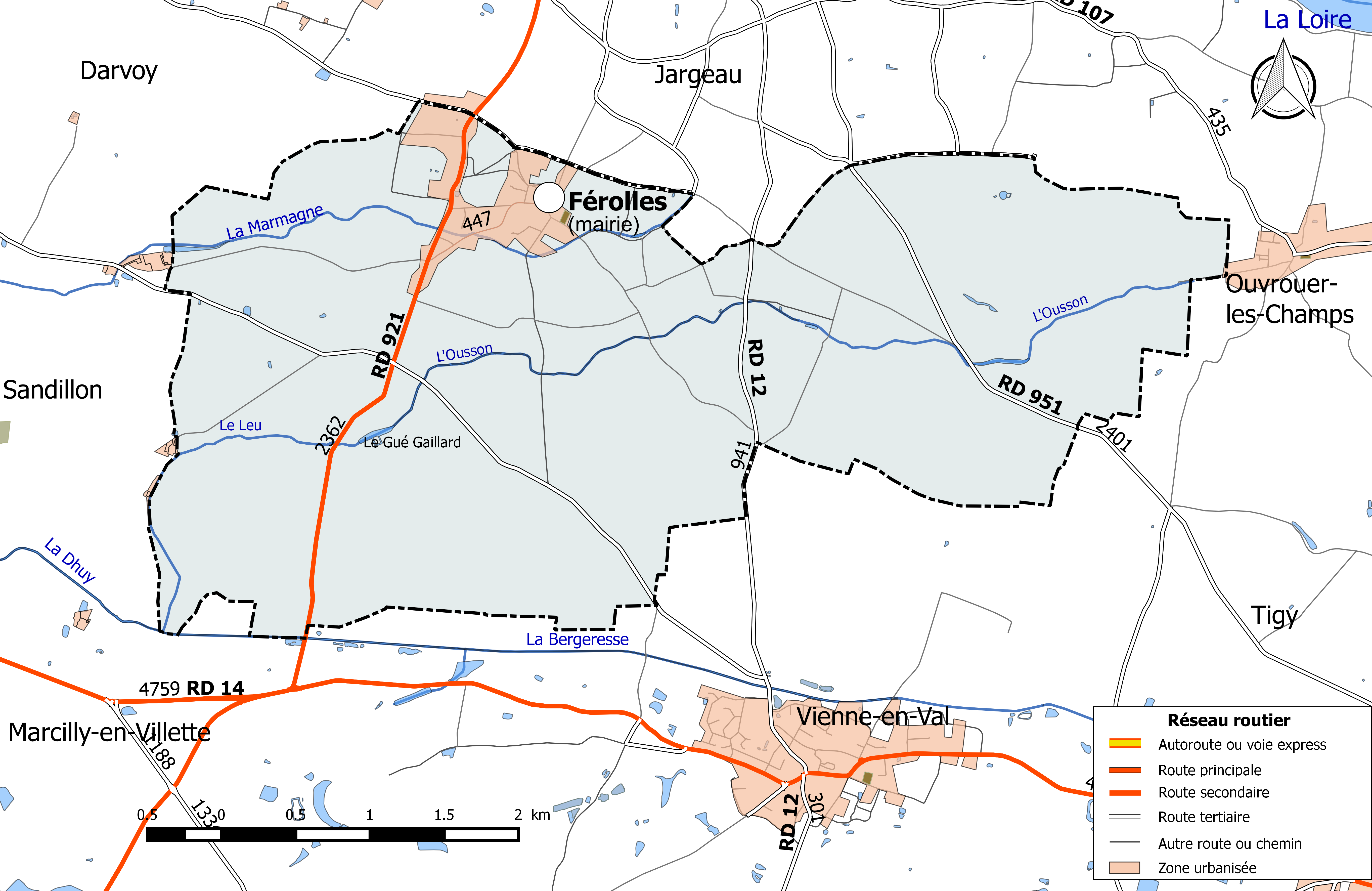 Carte du réseau routier de la commune de Férolles.